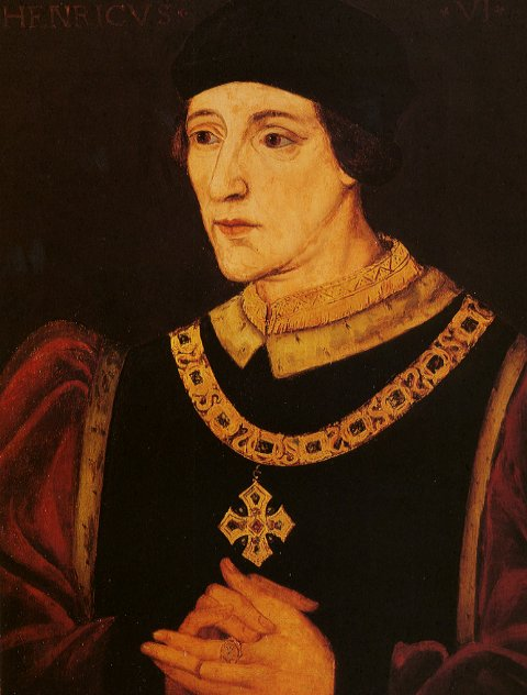 Henri VI d'Angleterre Il s'agit d'un portrait de Henri VI d'Angleterre issu de source de l'oeuvre originale inconnue. L'oeuvre originale est dans le domaine public vu son âge. Il peut figurer sur wikipedia, conformément à la politique wiki en matière de peinture, telle qu'elle figure sur : "Accurate photographs of paintings lack expressive content and are automatically in the public domain once the painting's copyright has expired (which it has in the US if it was published before 1923). All other copyright notices can safely be ignored." Cette position, qui résulte du jugement Bridgeman -v- Corel, n'est pas contraire au droit d'auteur français, s'agissant de photographies de tableaux dépourvues d'originalité au sens du code de la propriété intellectuelle. Kelson 21 mai 2004 à 17:01 (CEST)